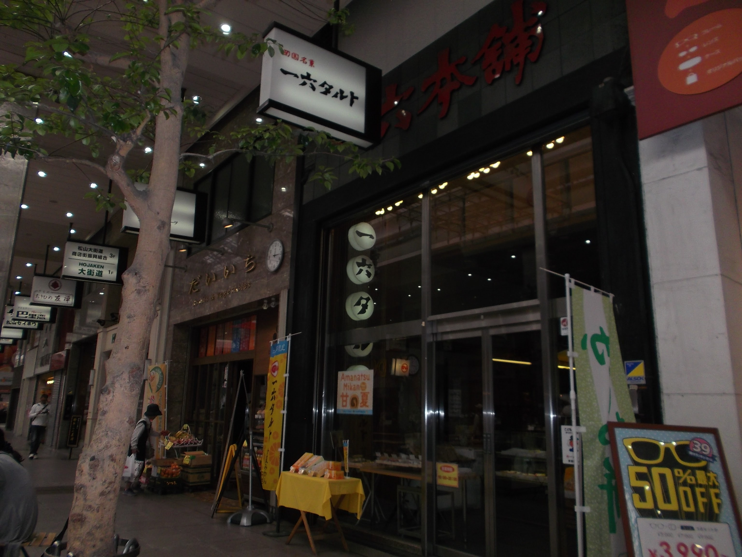 一六本舗大街道本店